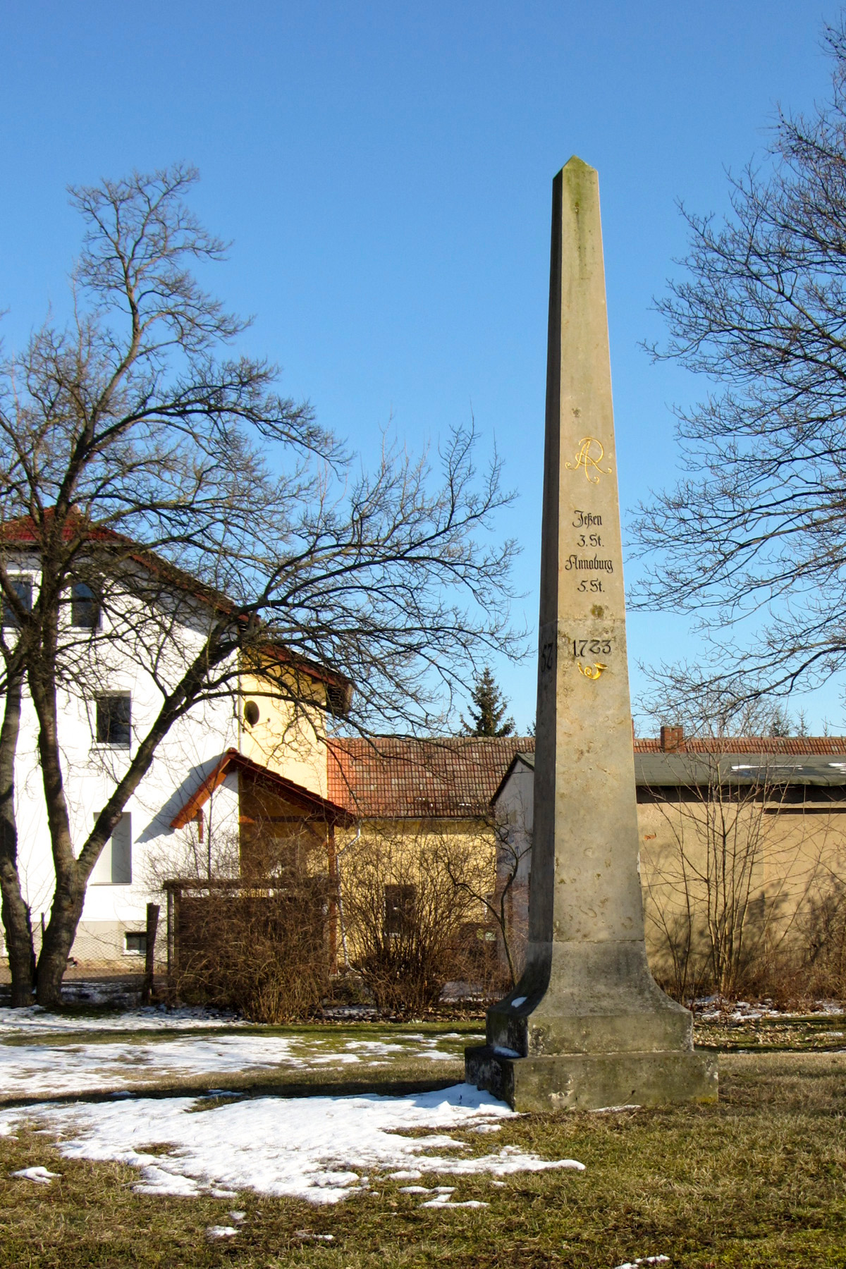 Kursächsische Postmeilensäule Ganzmeilensäule in Mühlanger